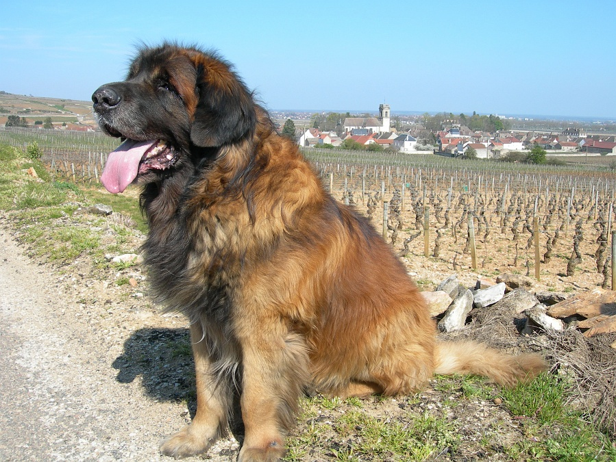 Ejemplar de Leonberger.